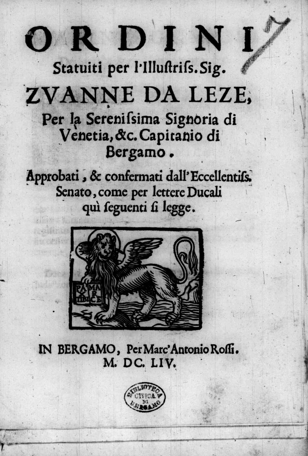 Frontespizio